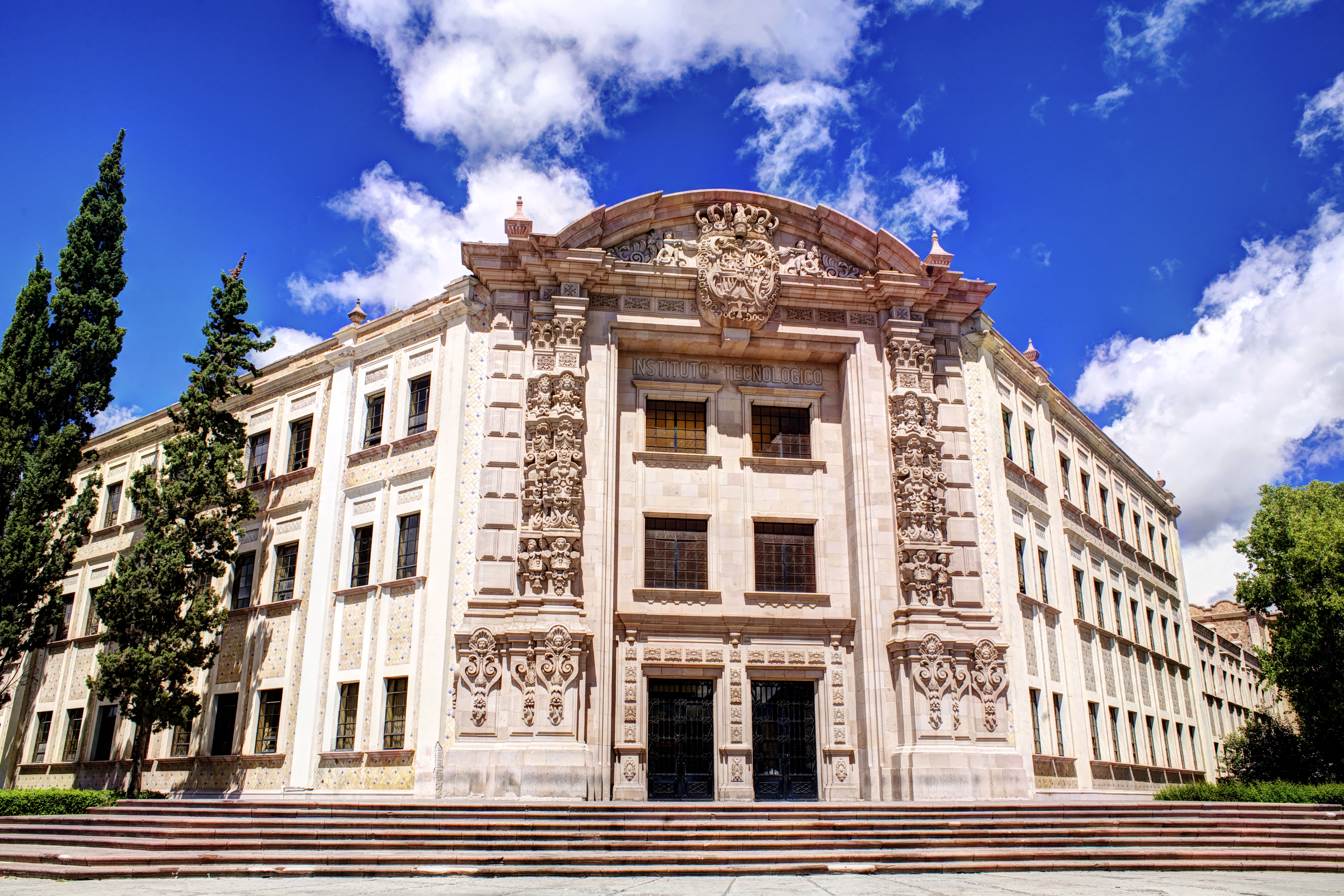 Fachada del Instituto Tecnológico de Saltillo Coahuila.